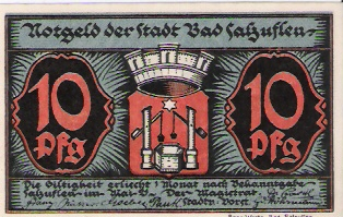 Deutschland - Nordrhein-Westfalen - Kreis Lippe - Bad Salzuflen: 10-Pfennig-Notgeld-Schein (Vorderseite) der Stadt Bad Salzuflen